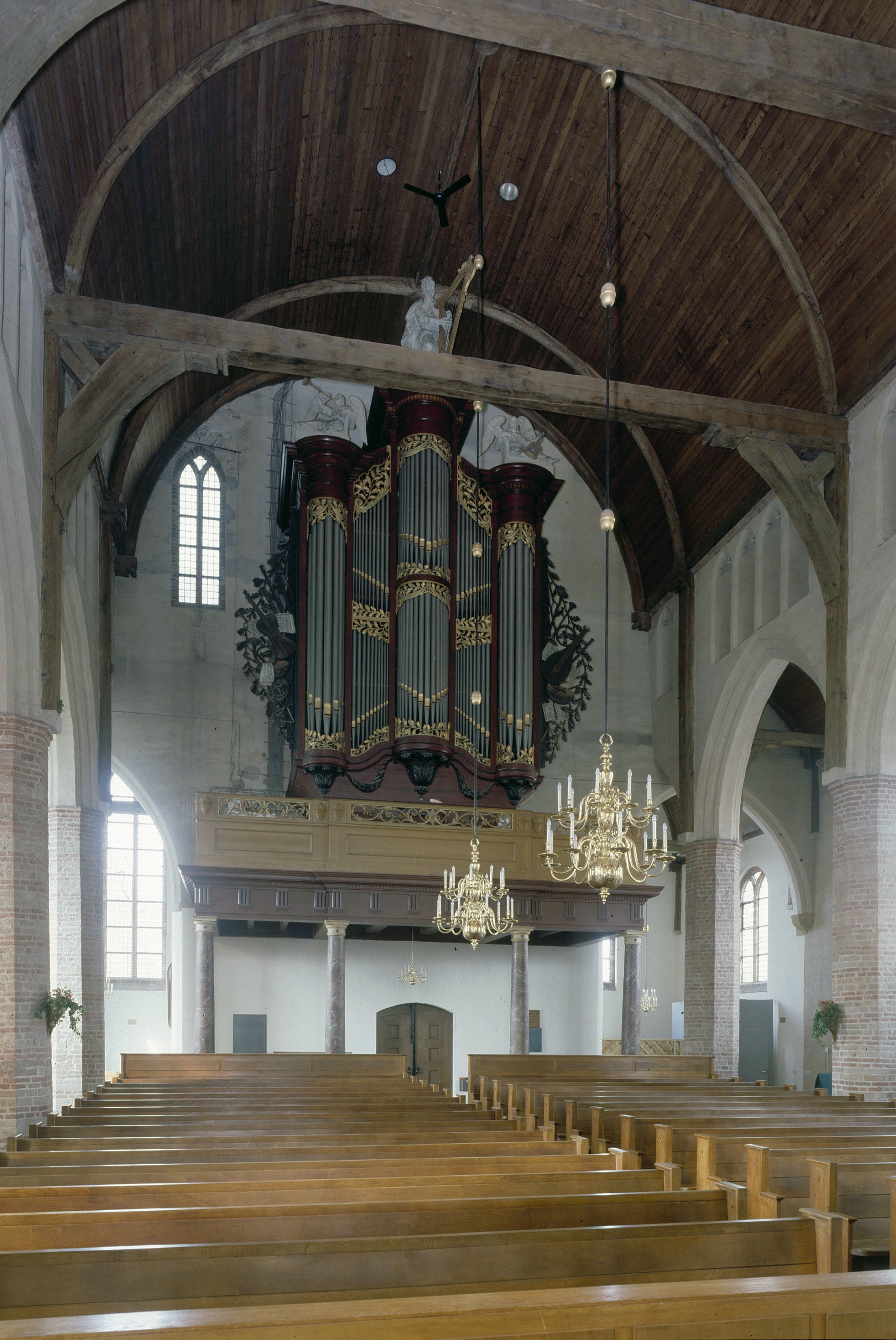 Oude Kerk: Interieur, aanzicht orgel, orgelnummer 1016 (opmerking: Gefotografeerd voor Het Historische Orgel in Nederland 1819-1840, bladzijde 272)